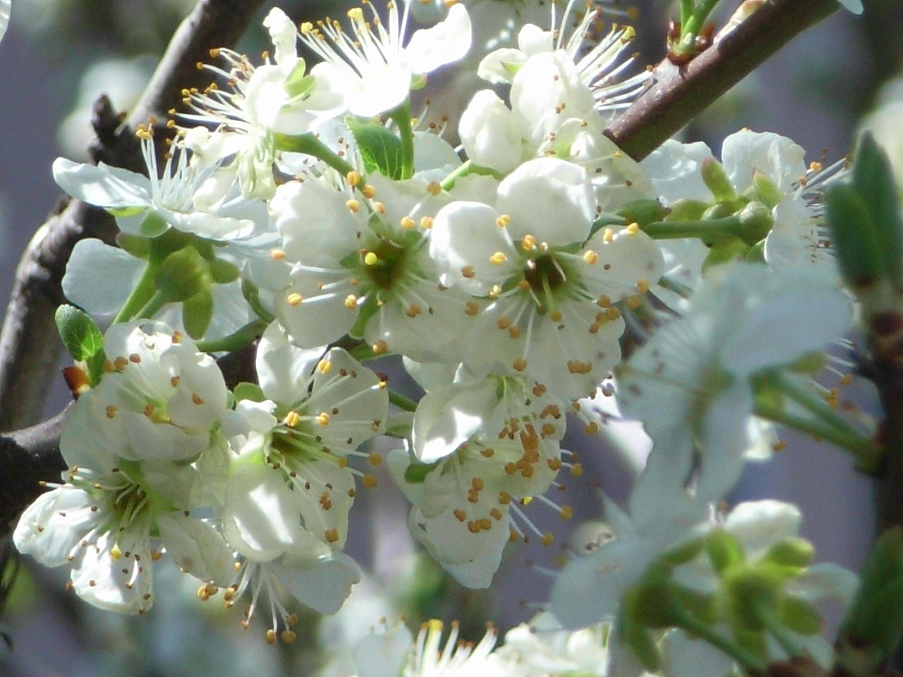 Zwetschgenblüten